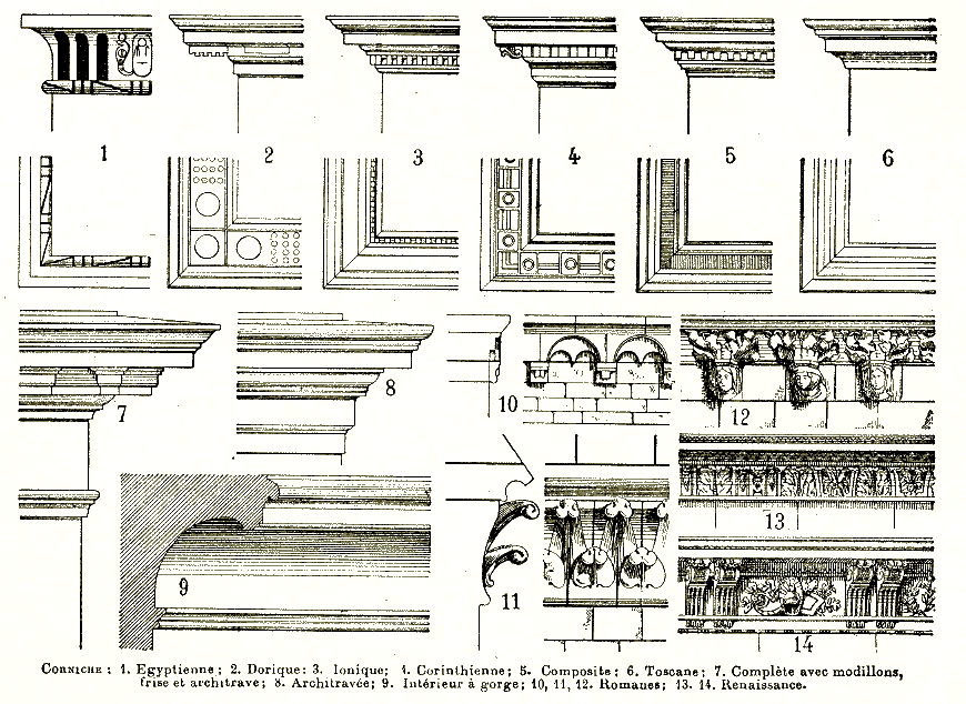 exemples de corniches Source scannée depuis le Larousse 1922 par Nataraja-Shiva